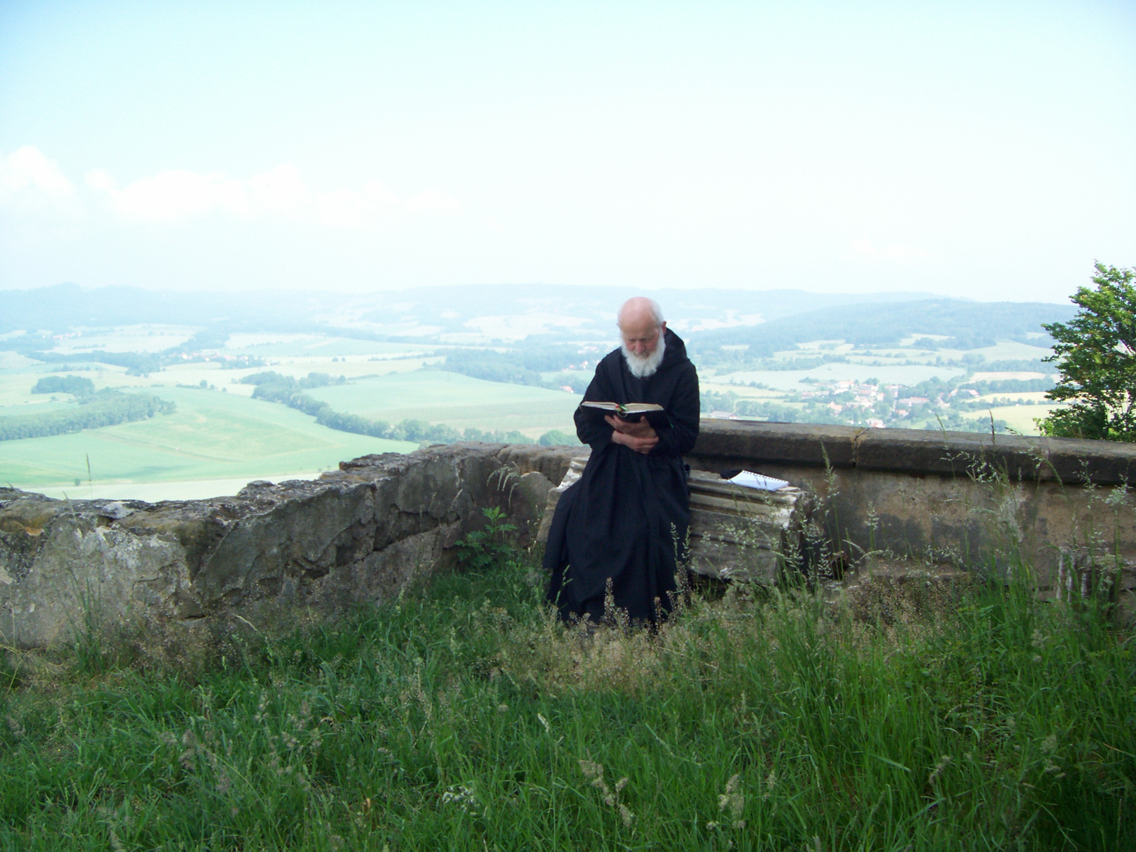 Český benediktin P. Radim Valík na Ostrém u Úštěku